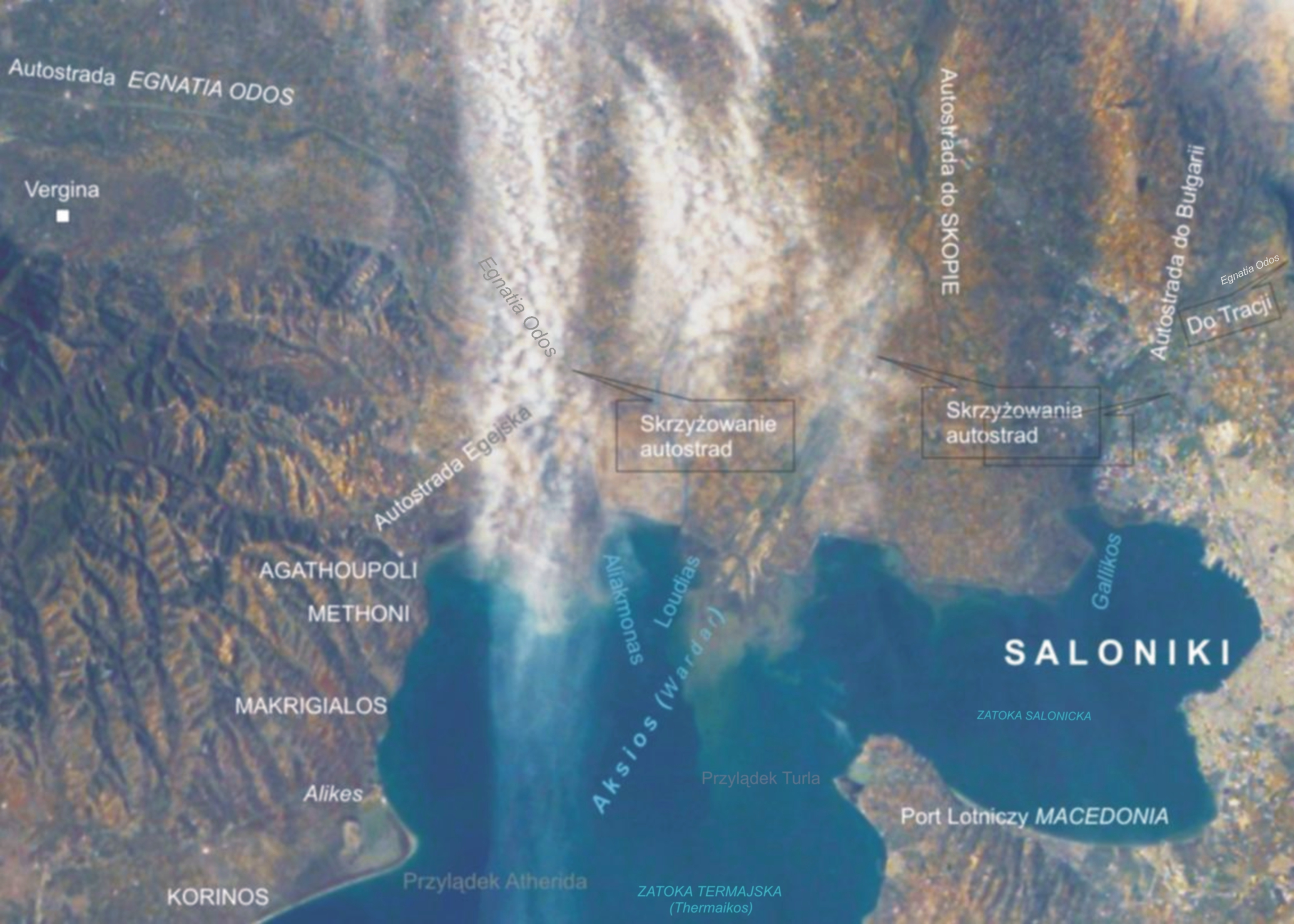 Zdjęcie satelitarne geograficznego otoczenia delty Aksiosu (Wardaru)